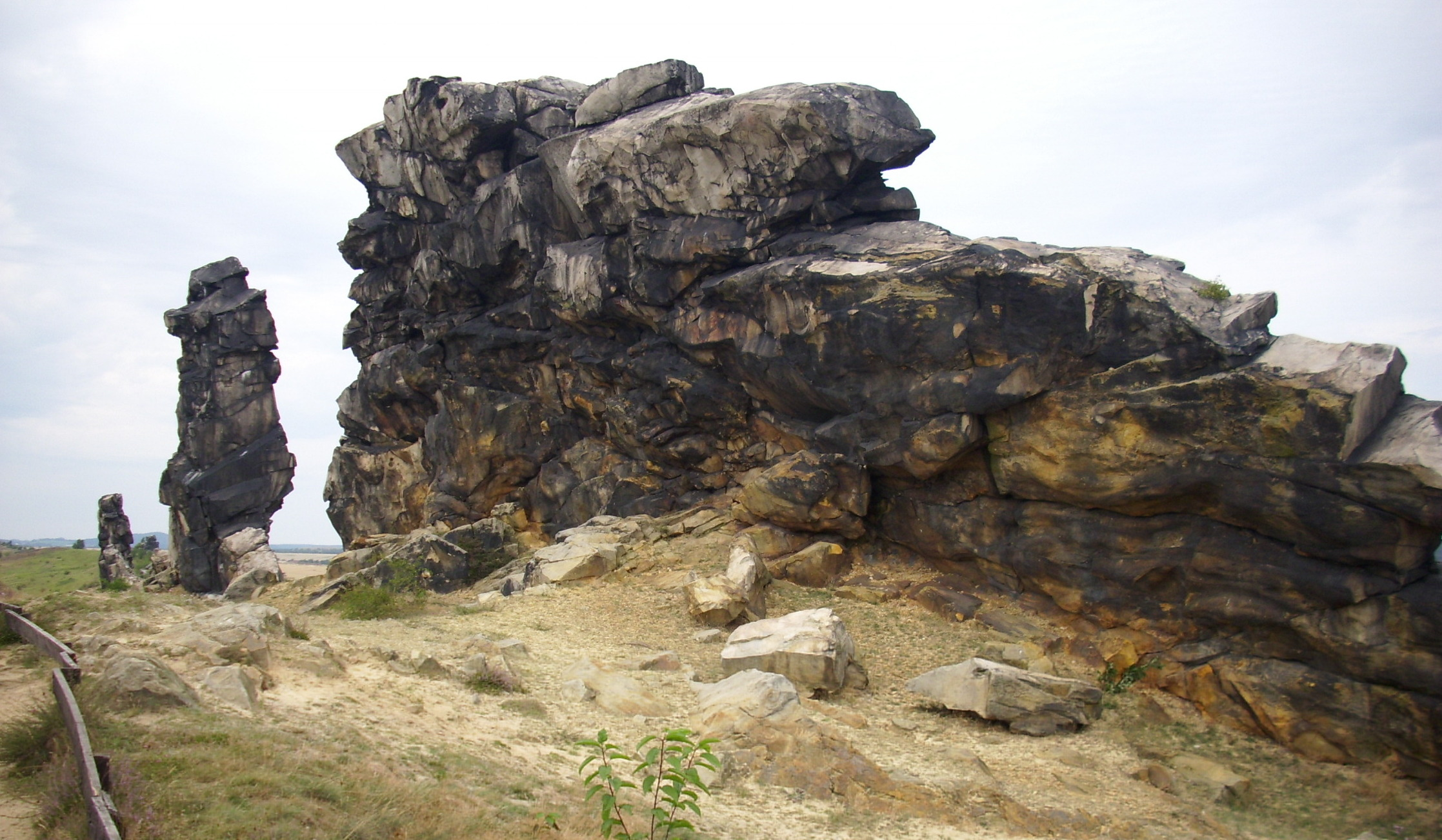 Formation der Teufelsmauer bei Weddersleben, Naturschutzgebiet „Teufelsmauer und Bode nordöstlich Thale“